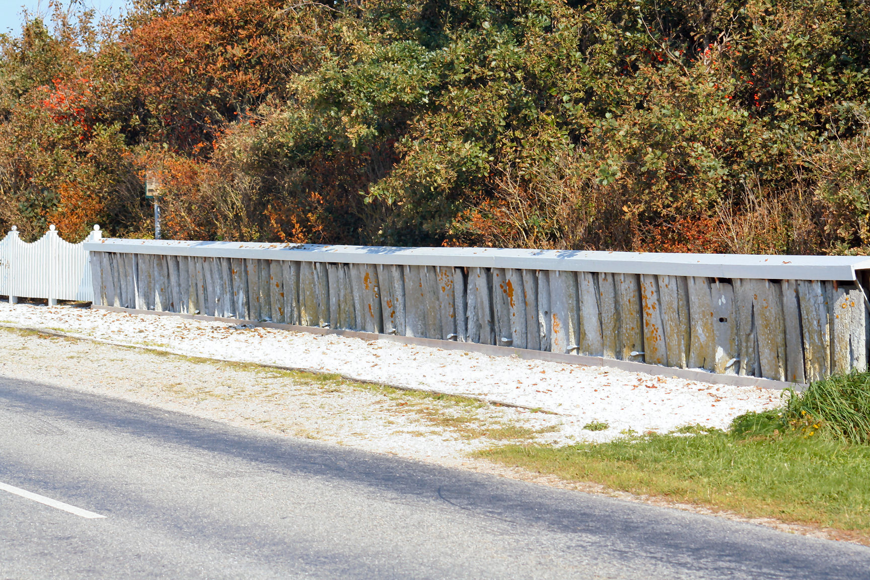 Rest des historischen Walfischzaunes von 1772